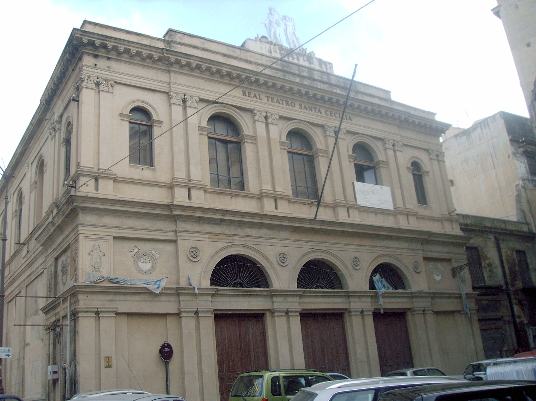 sono l'autore rilascio tutti i diritti